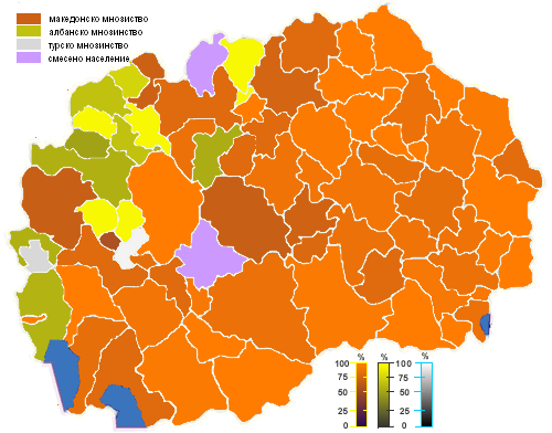 Етническа карта на Република Македония по общини 2002г.